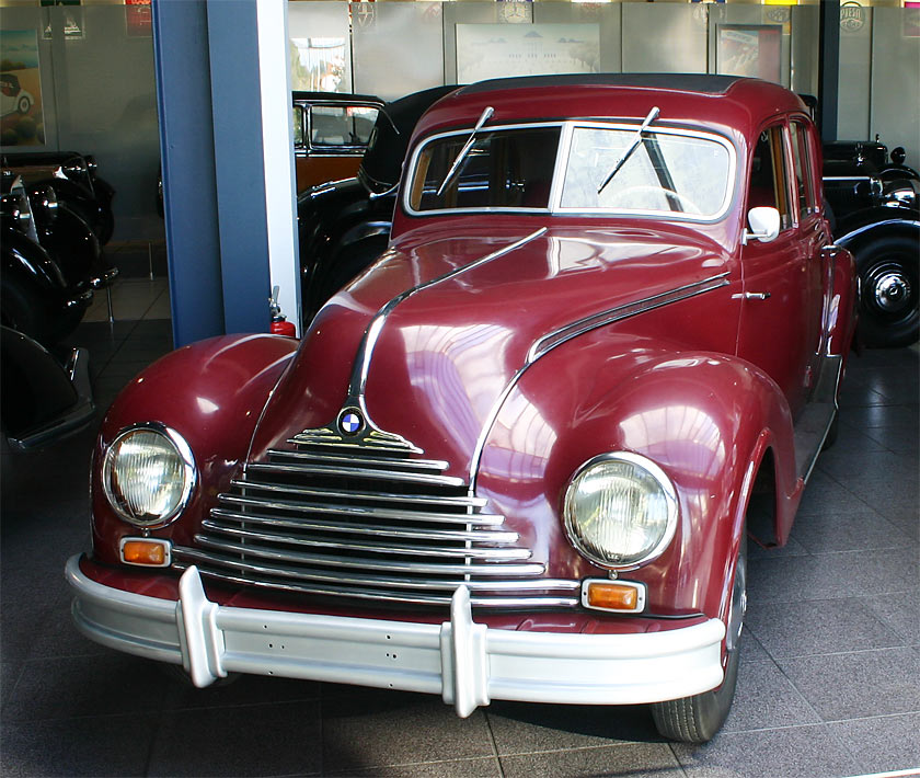 EMW 340 Limousine fotografiert von Softeis, am 3.10.2004 im EFA-Museum für Deutsche Automobilgeschichte first upload in de wikipedia on 02:31, 7. Nov 2004 by Softeis